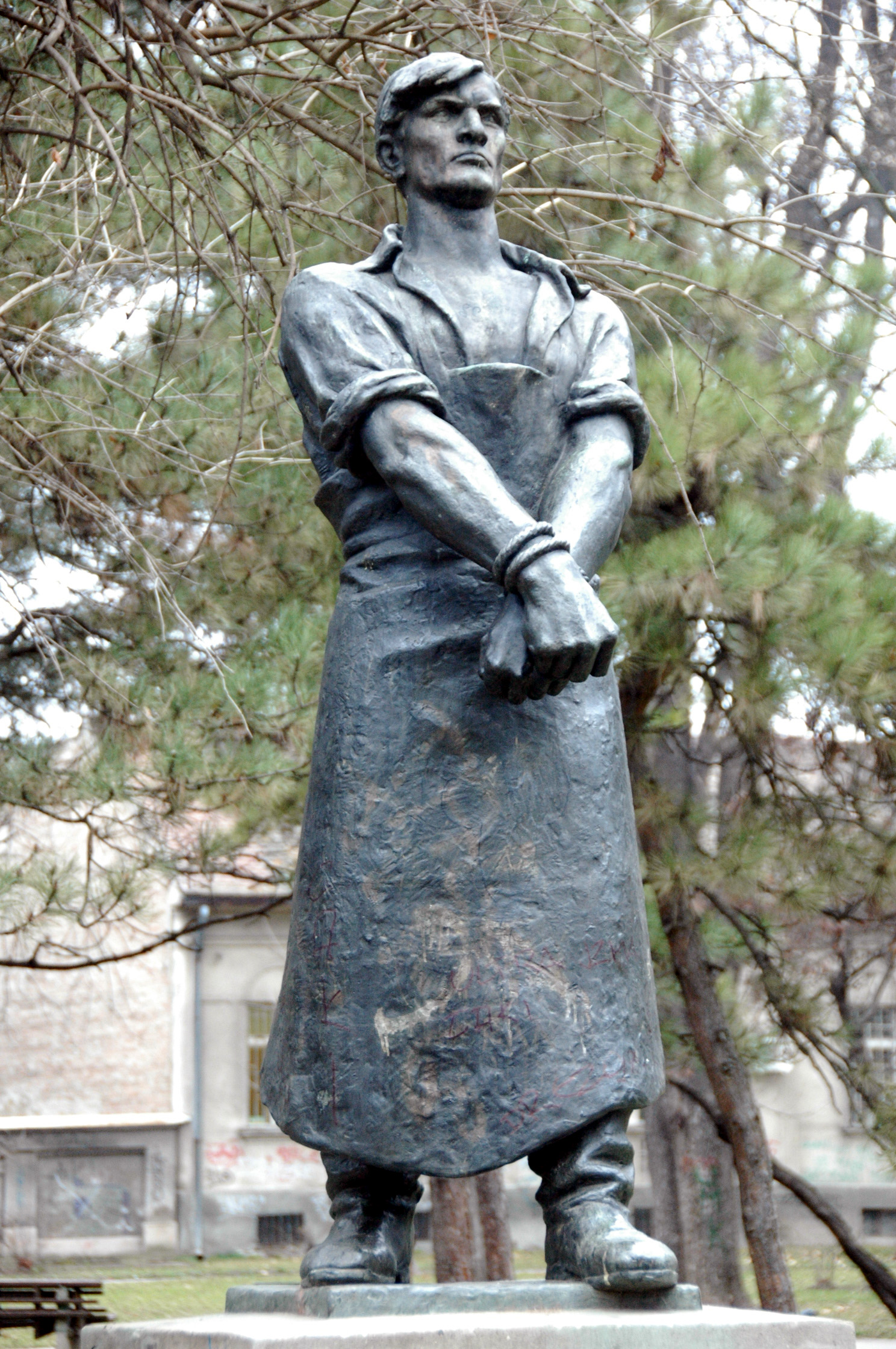 Spomenik Radnik Zemunski park